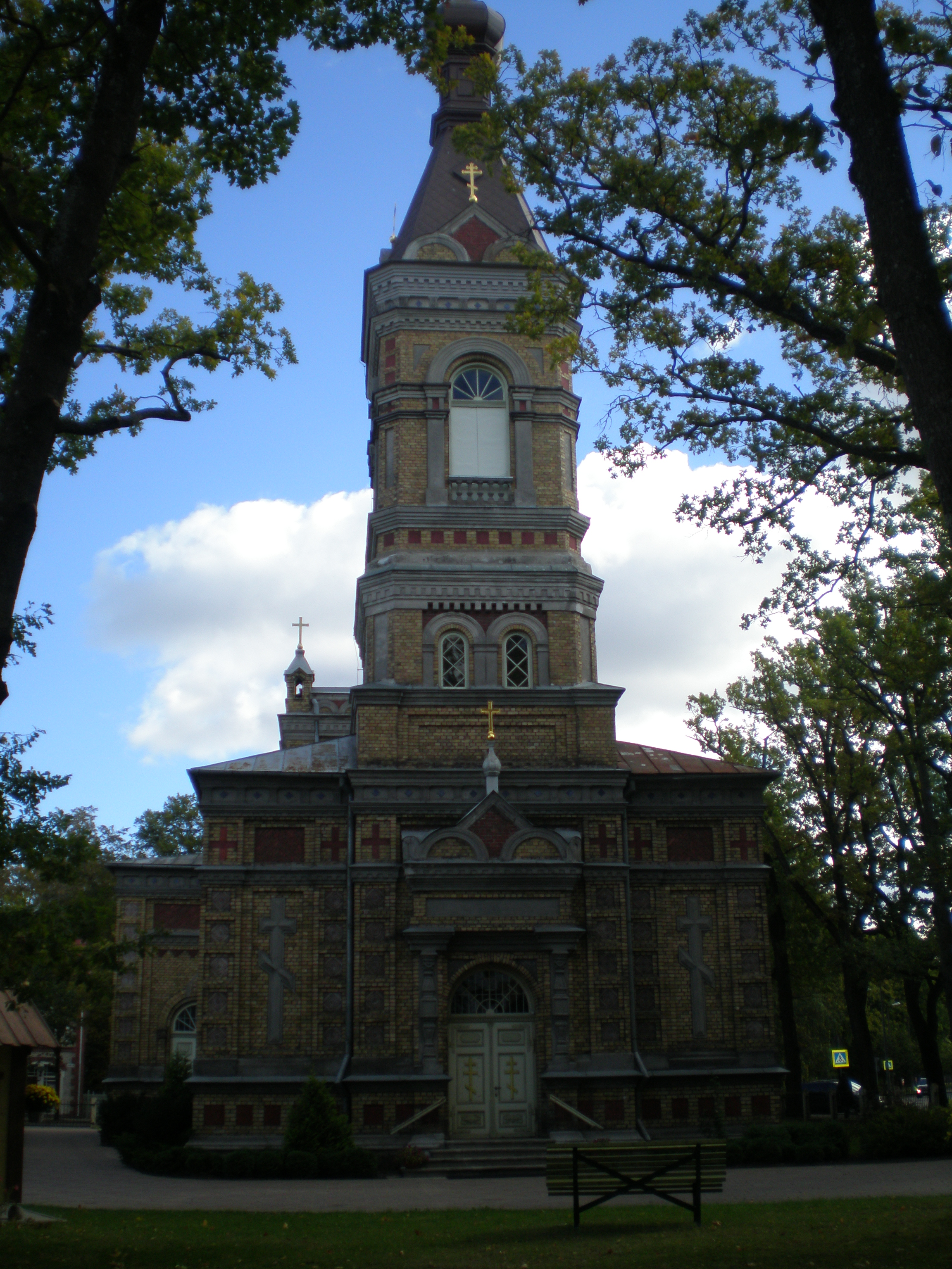 Kiriku eestvaade, pildistatud kirikuaiast